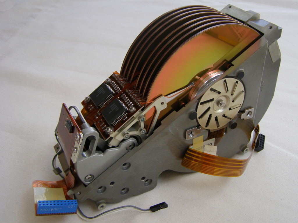 A 5 1/4 Hard disk. 350 Mbytes Viejo disco duro de 350 Mbytes de capacidad